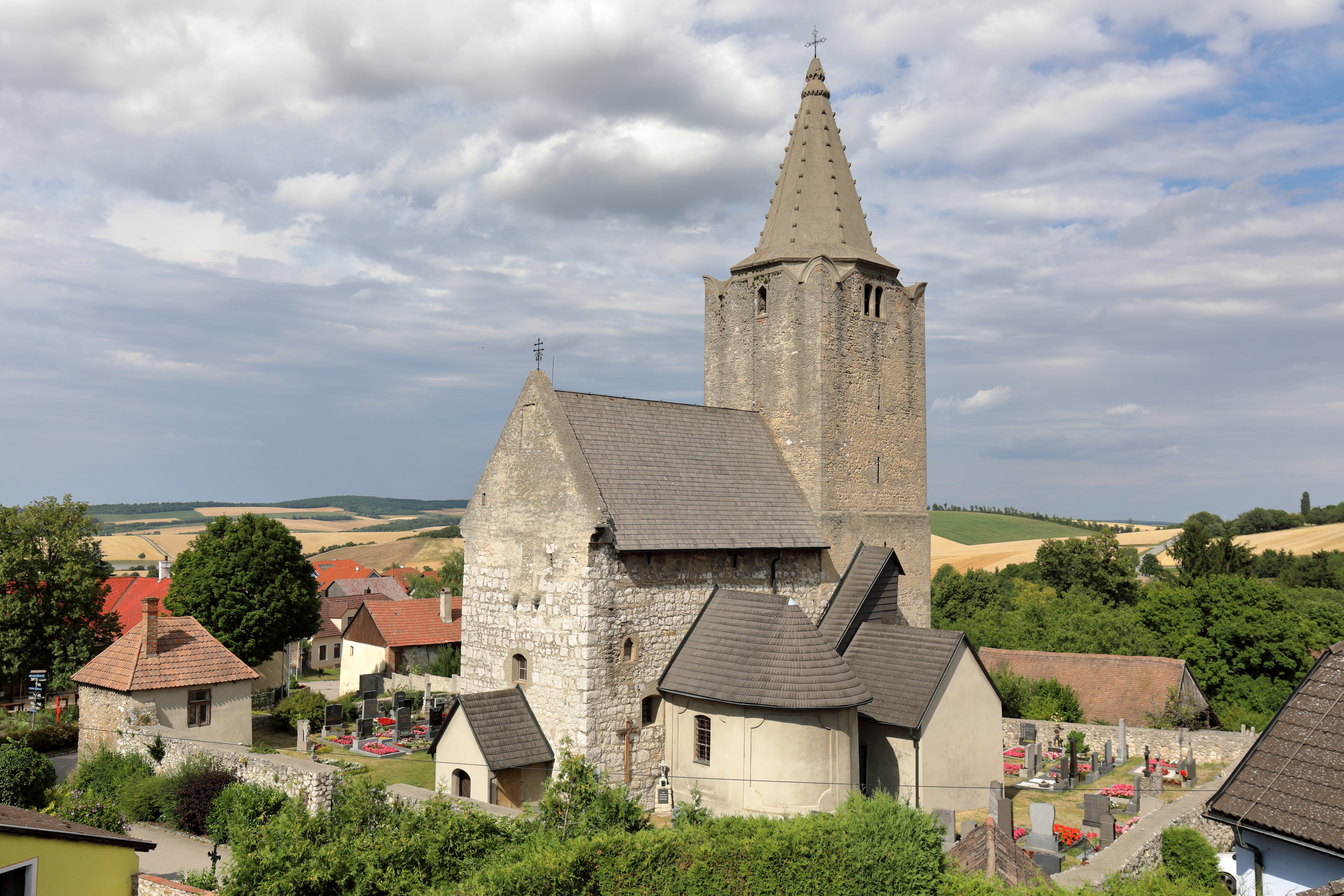 Südwestansicht der röm.-kath. Pfarrkirche hl. Veit in Michelstetten, ein Ortsteil der niederösterreichischen Marktgemeinde Asparn an der Zaya. Die spätromanische Wehrkirche mit frühgotischem Chorturm und eingezogener Rundapsis ist der älteste Kirchenbau im nordöstlichen Weinviertel. Sie ist von einem Friedhof umgeben, dessen Mauer teilweise frühmittelalterlich ist. Das Glockengeschoss des Turmes wurde im 16. Jahrhundert aufgesetzt und die eingeschossige Sakristei an der südlichen Chorturmwand wurde im Spätmittelalter errichtet. Die barocken und rund geschlossenen Kapellen mit Lisenengliederung an der Nord- und Südseite des Langhaus wurden 1752 angebaut.